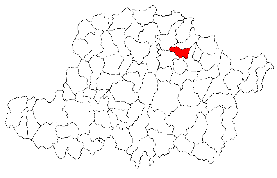 Categorie:Hărţi ale judeţului Arad